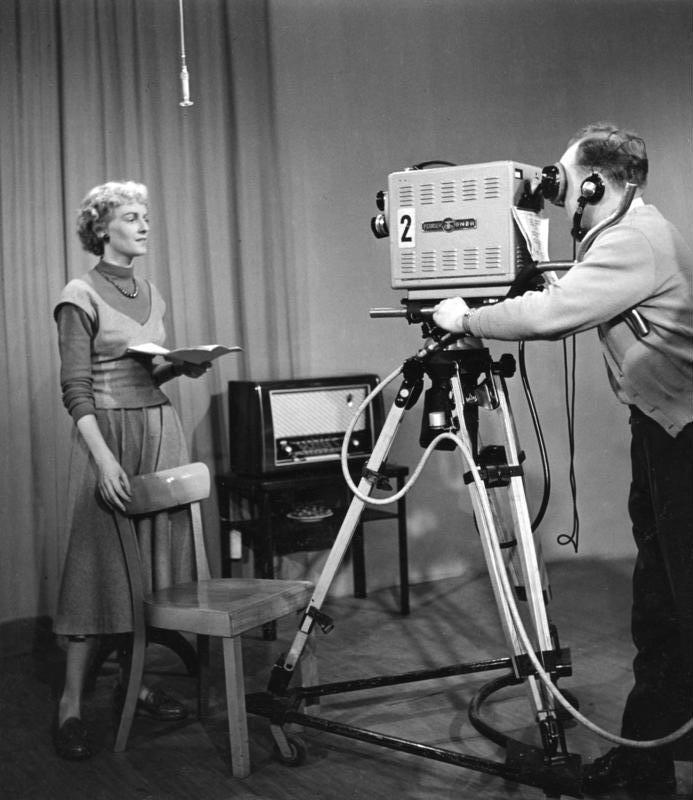 Fernsehstudio Köln Die ehemalige Schauspielerin Gabriela Hellweg während der Ansage